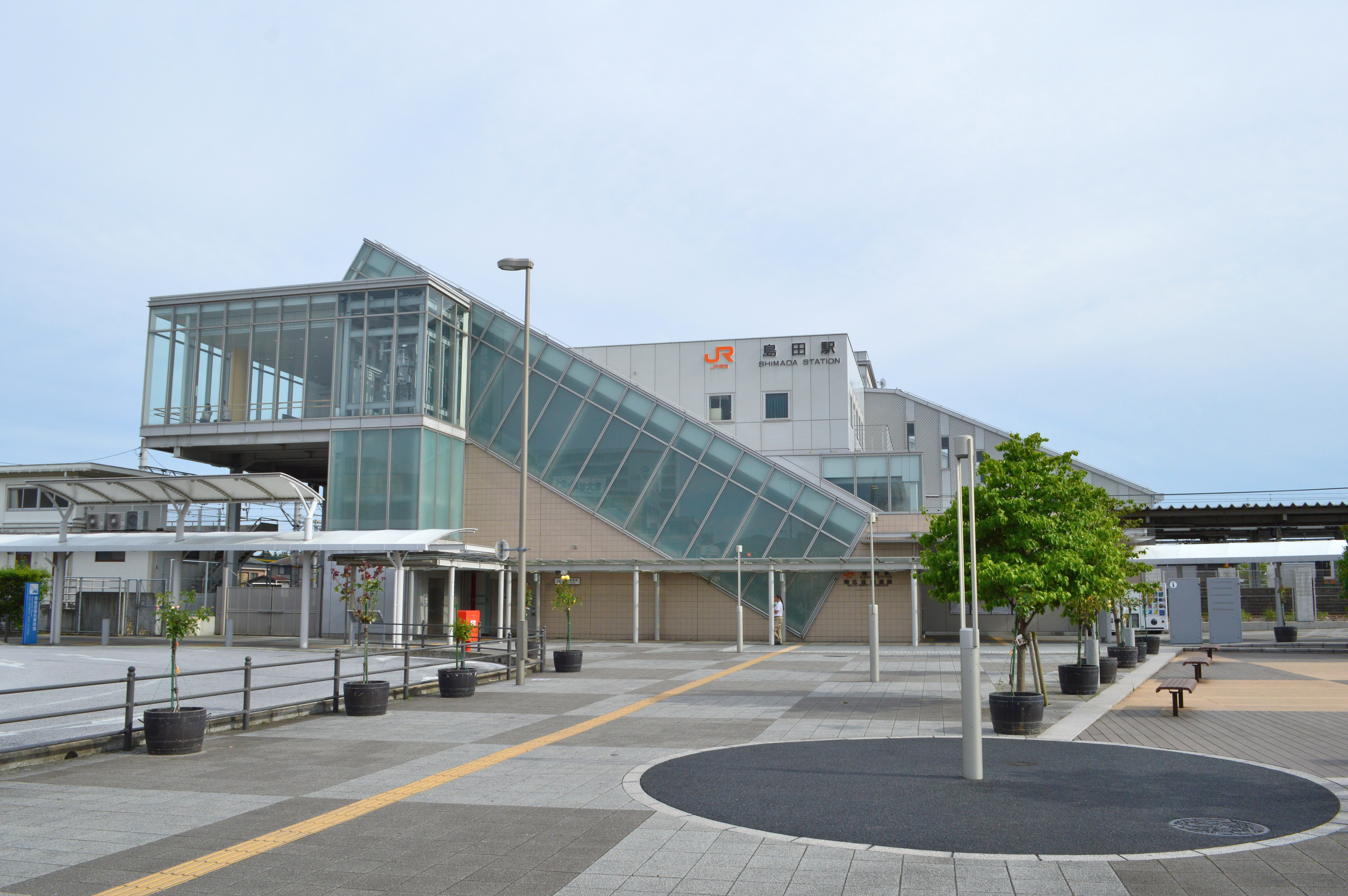 島田駅 北口全景